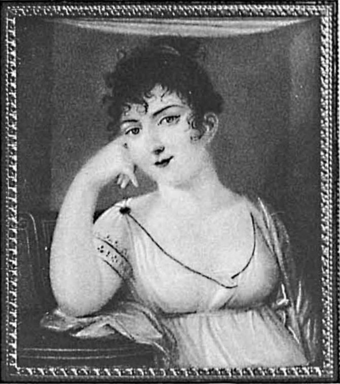 Елизавета Михайловна Ермолова, рожд.Голицына (1767-1833)